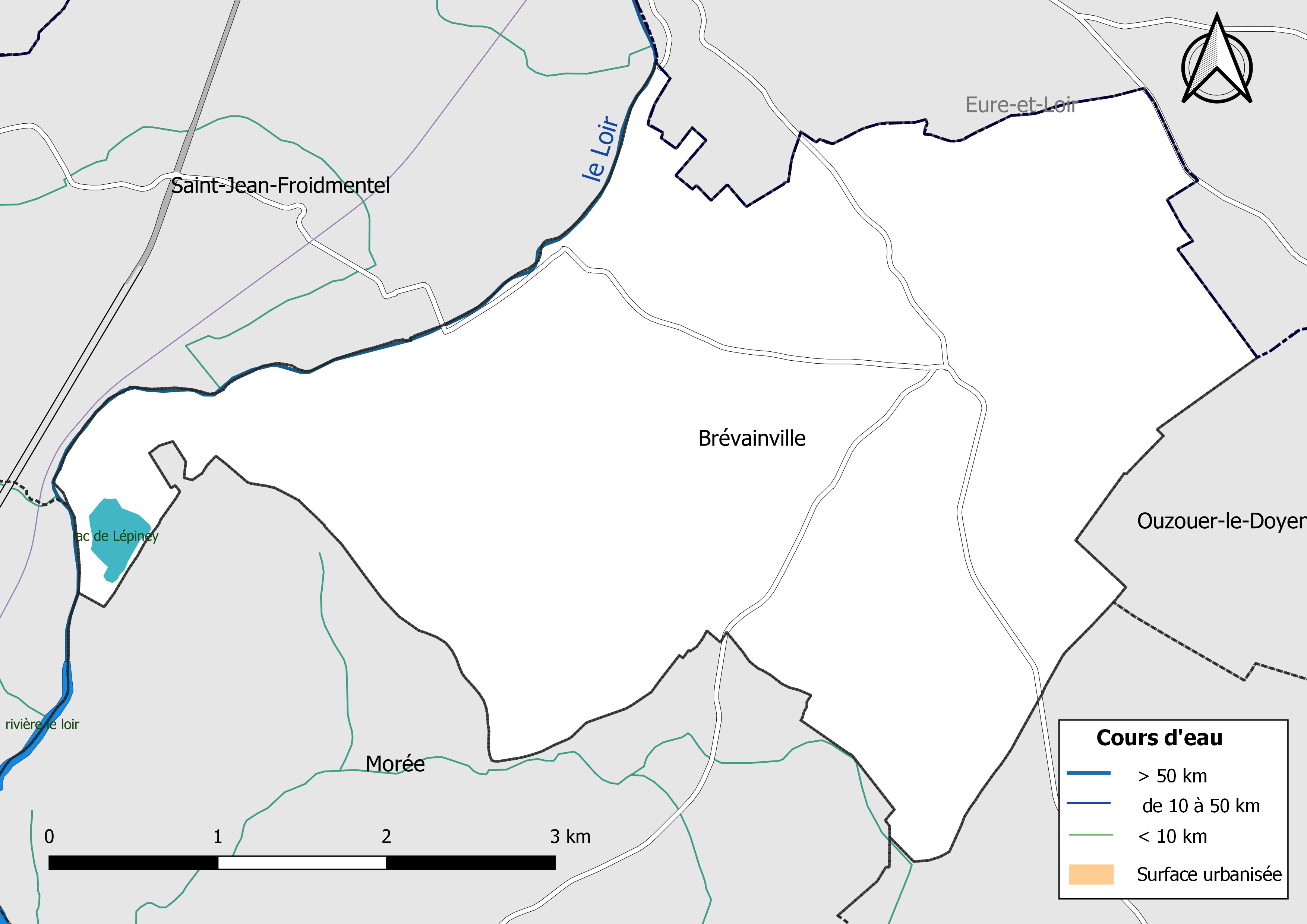 Carte du réseau hydrographique de la commune de Brévainville (Loir-et-Cher, France).